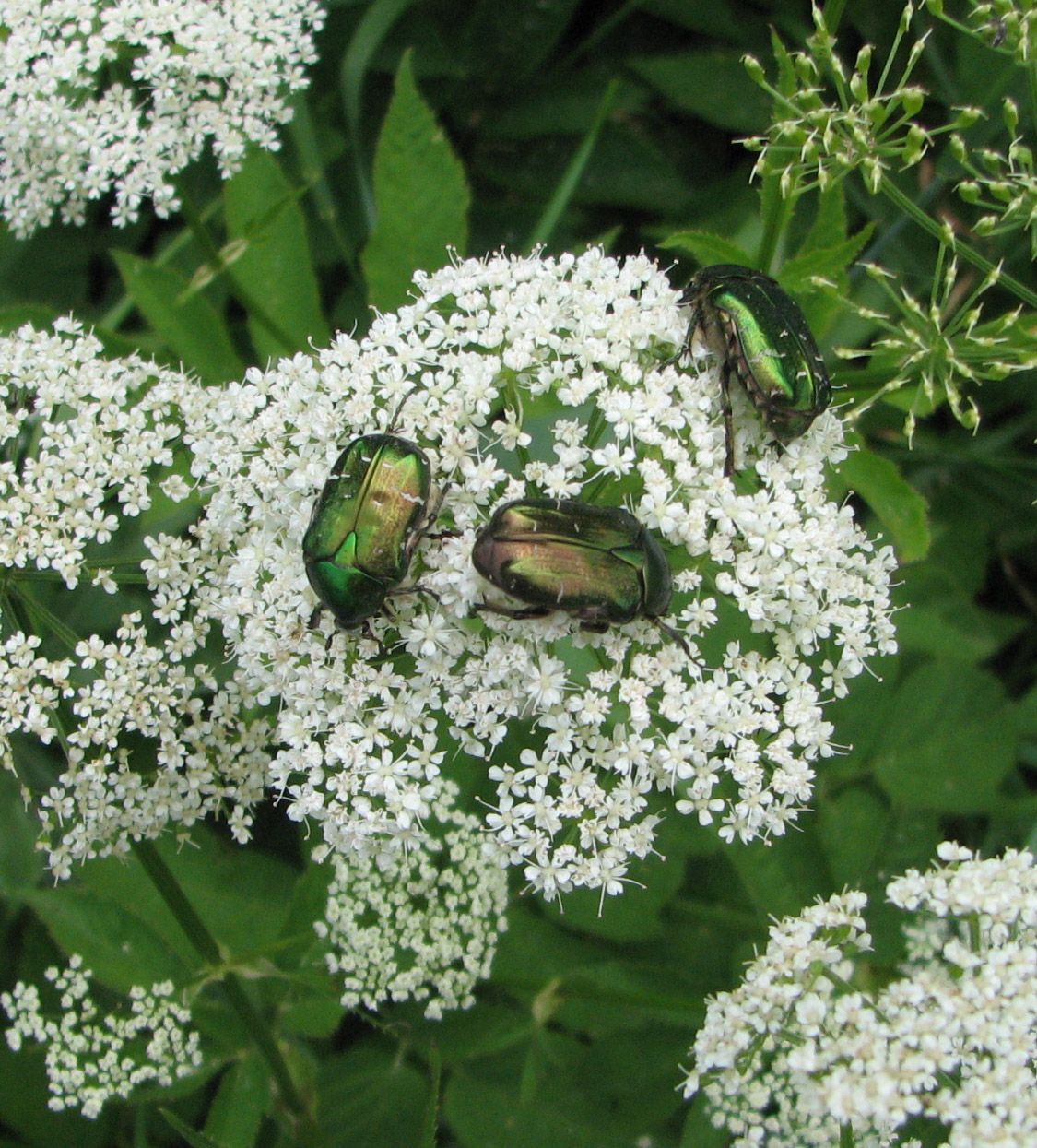 Cetonia aurata